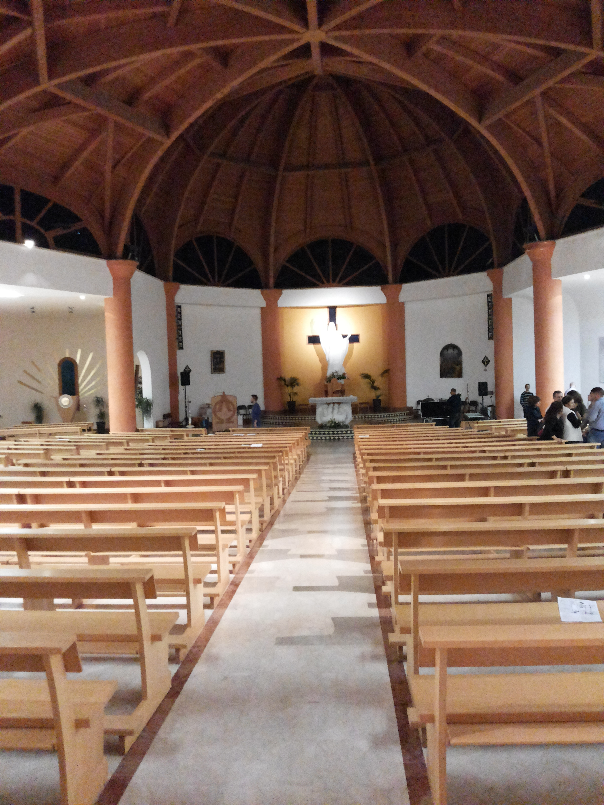 Gesù Cristo Redentore - Alcamo (interni)